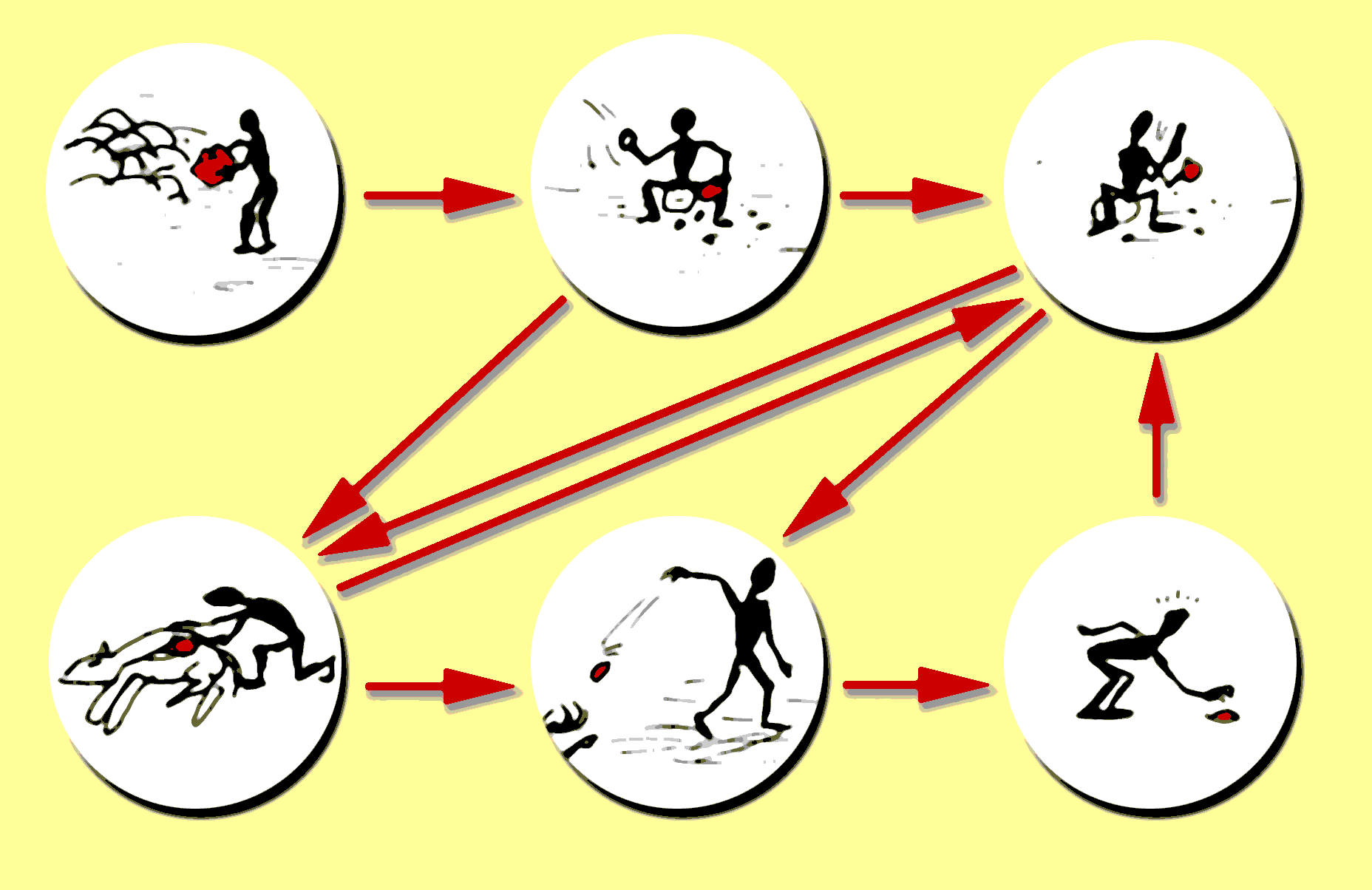 Chaîne opératoire d'aprés Leroi-Gourhan